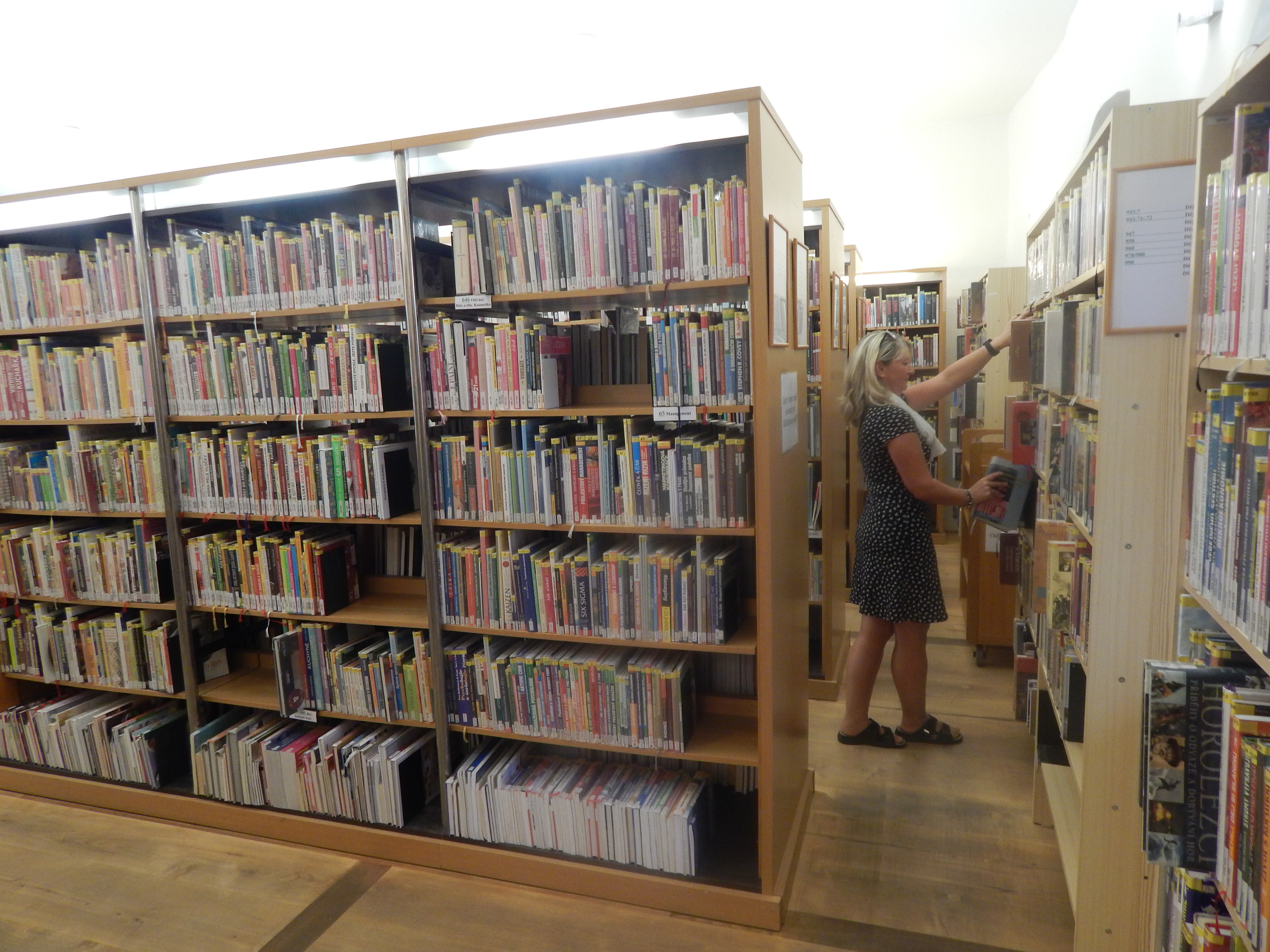 oddělení naučné literatury, Krajská knihovna v Pardubicích, 2019